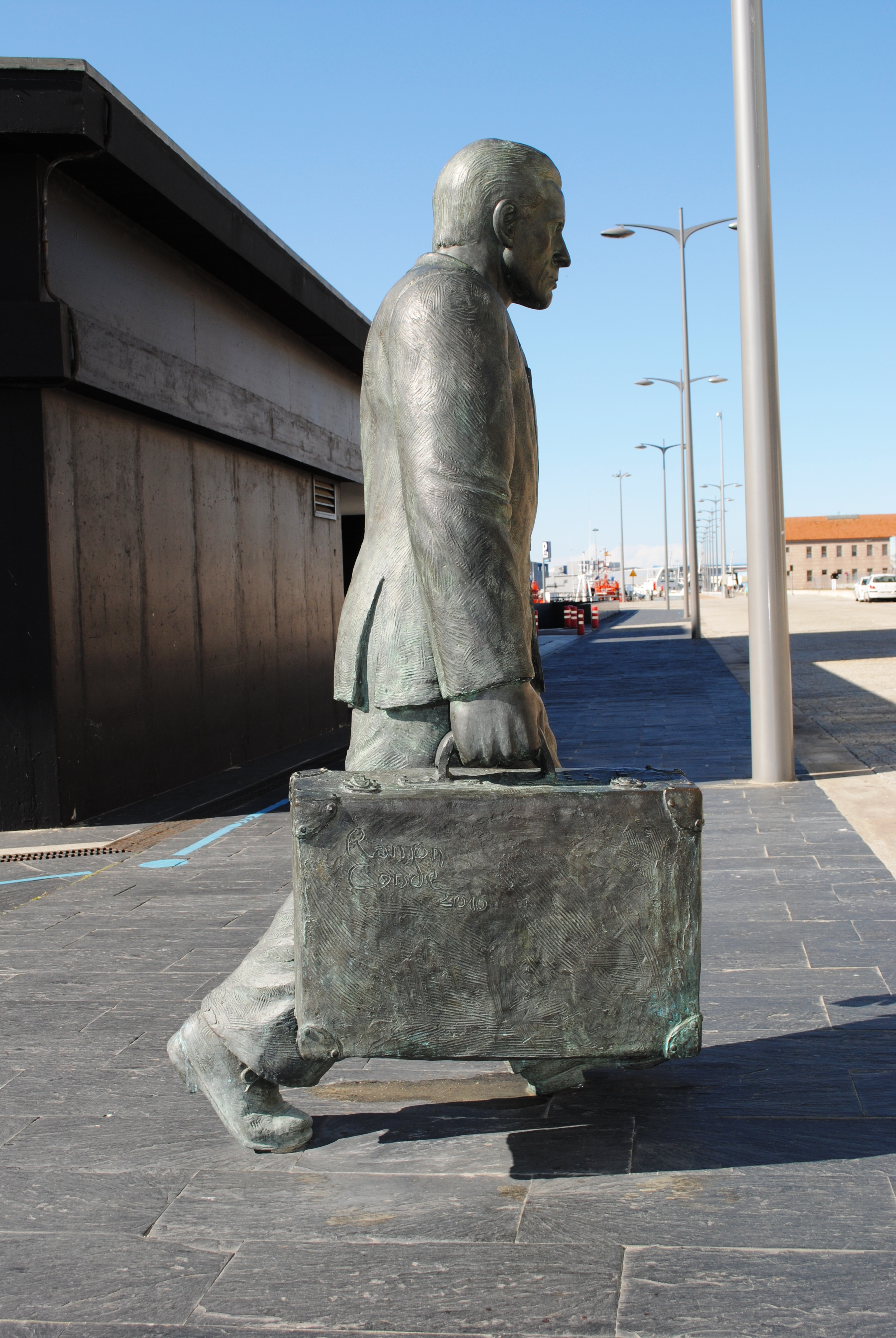 Ramón Conde, 2010, home, Vigo